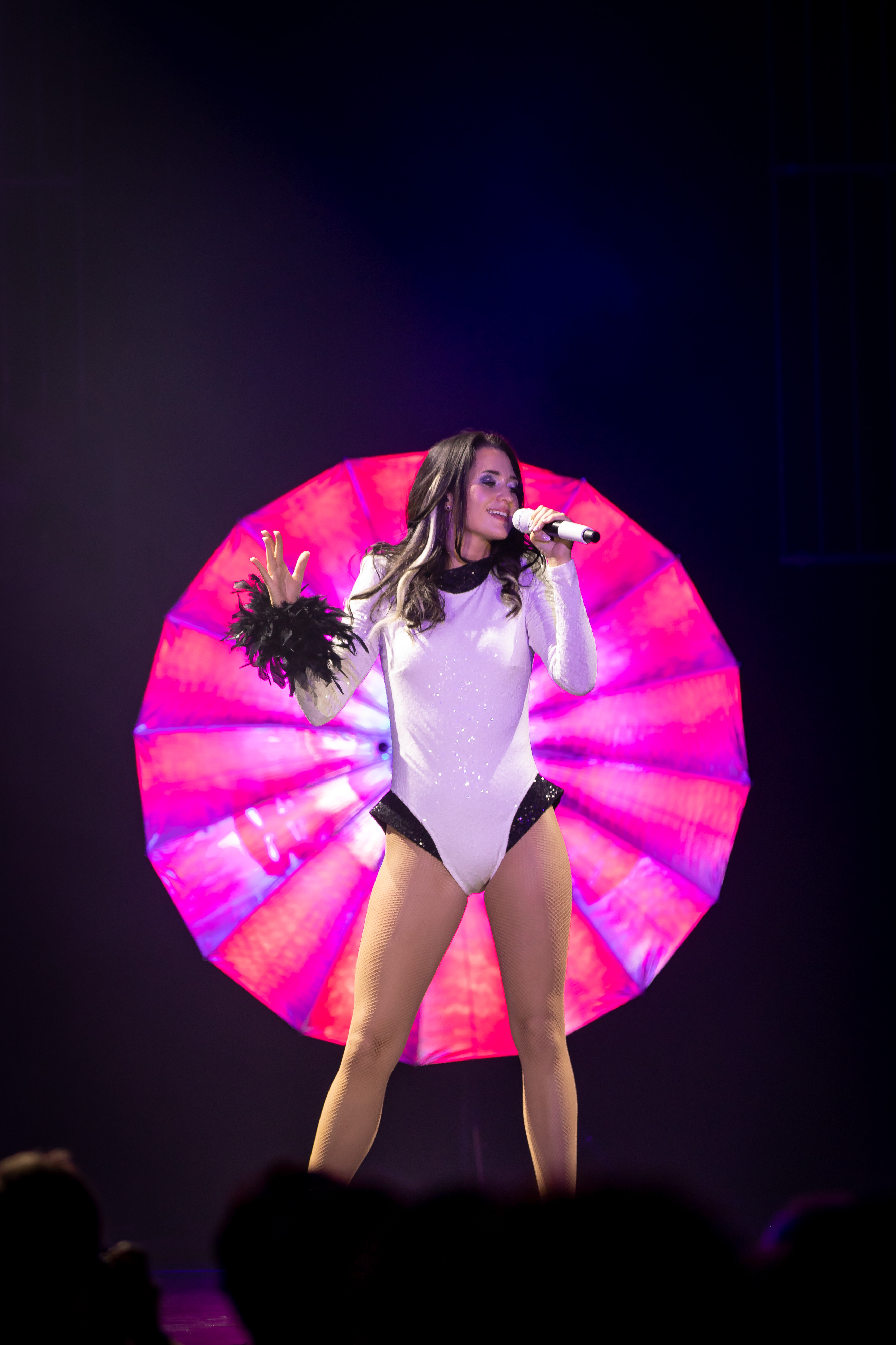 Live-Foto Madeline Willers